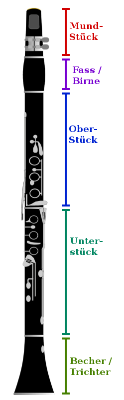 Bild einer Klarinette (deutsches System) mit beschrifteten Einzelteilen selbst erstellt mit CorelDraw und The Gimp von Benutzer:Mezzofortist